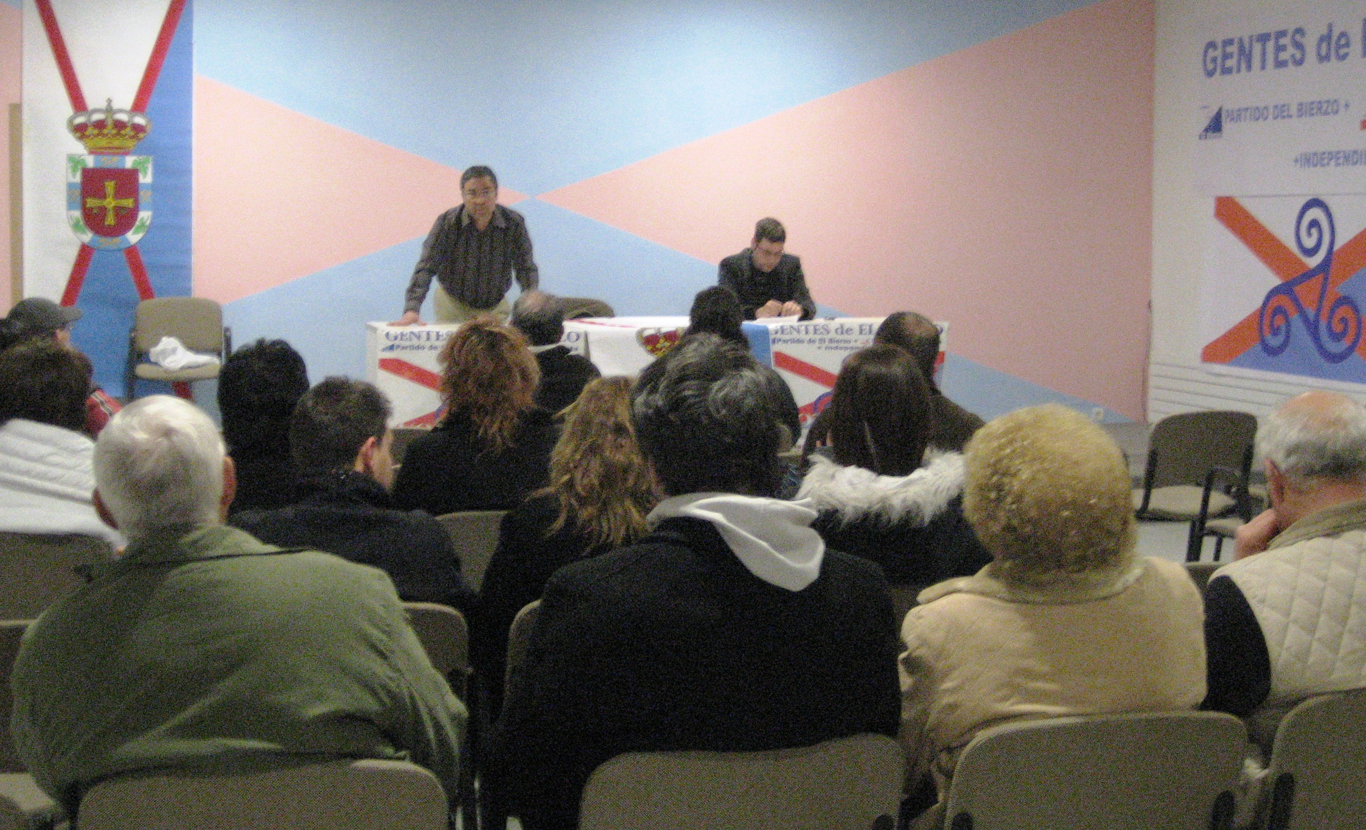 Mitín electoral de la coalción Gentes de El bierzo celebrado en el barrio ponferradino de La Placa